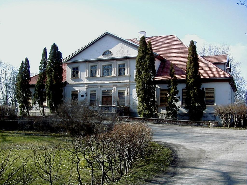 Pūres muižas pils 2000-04-15